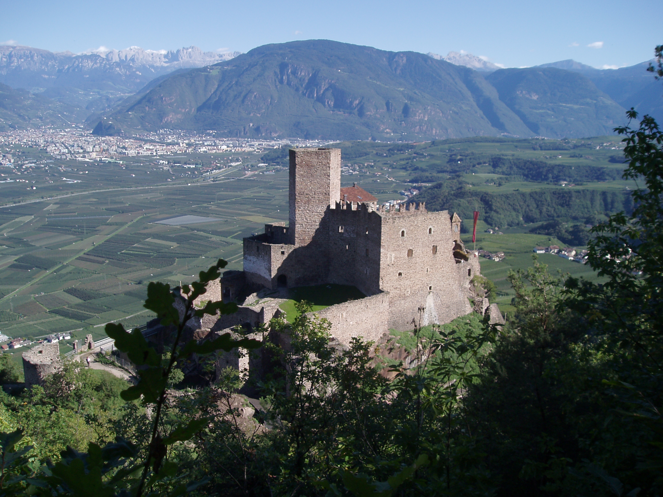 Burg Hocheppan, Südtirol, Italien